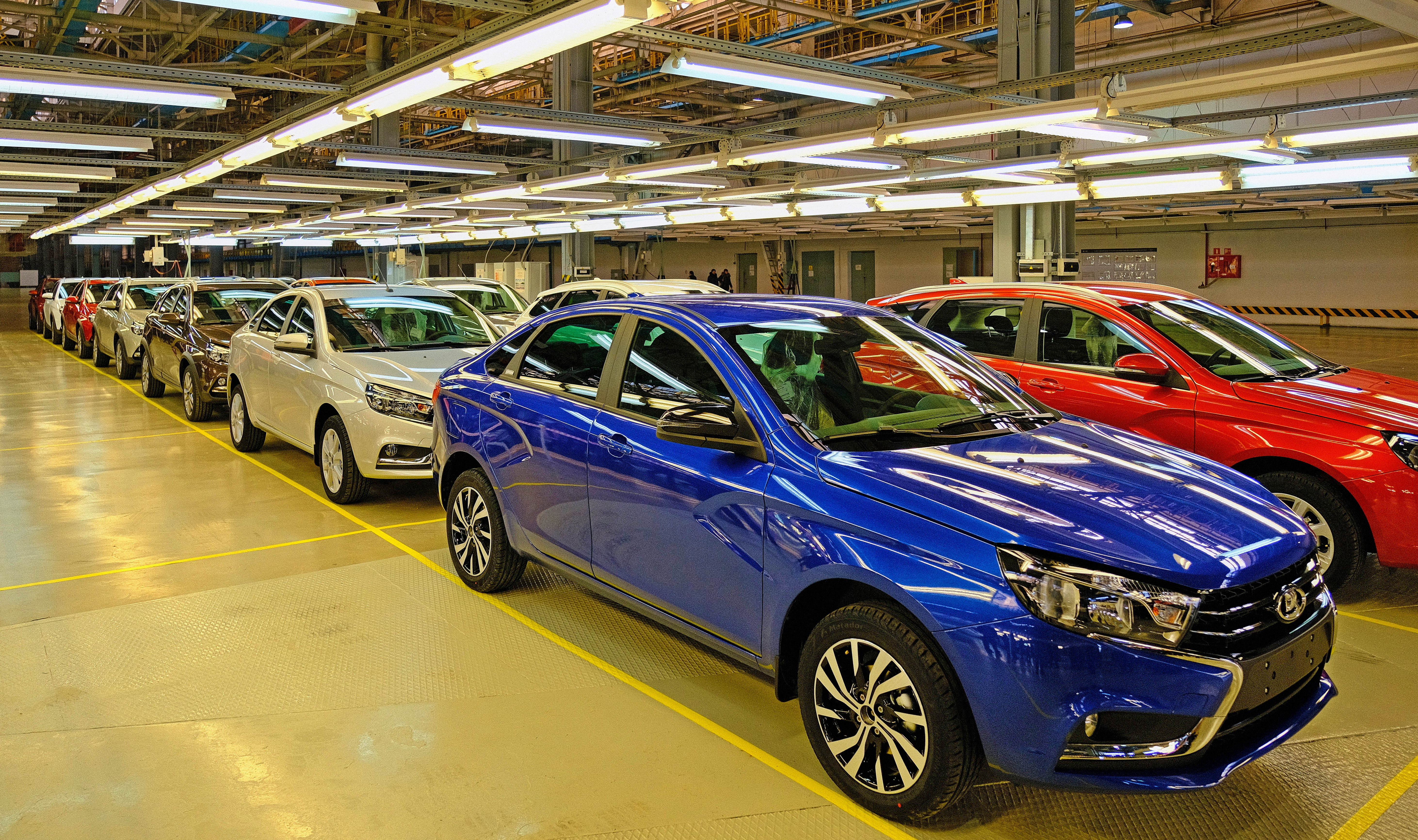 Зона готовой продукции Ижевского автозавода